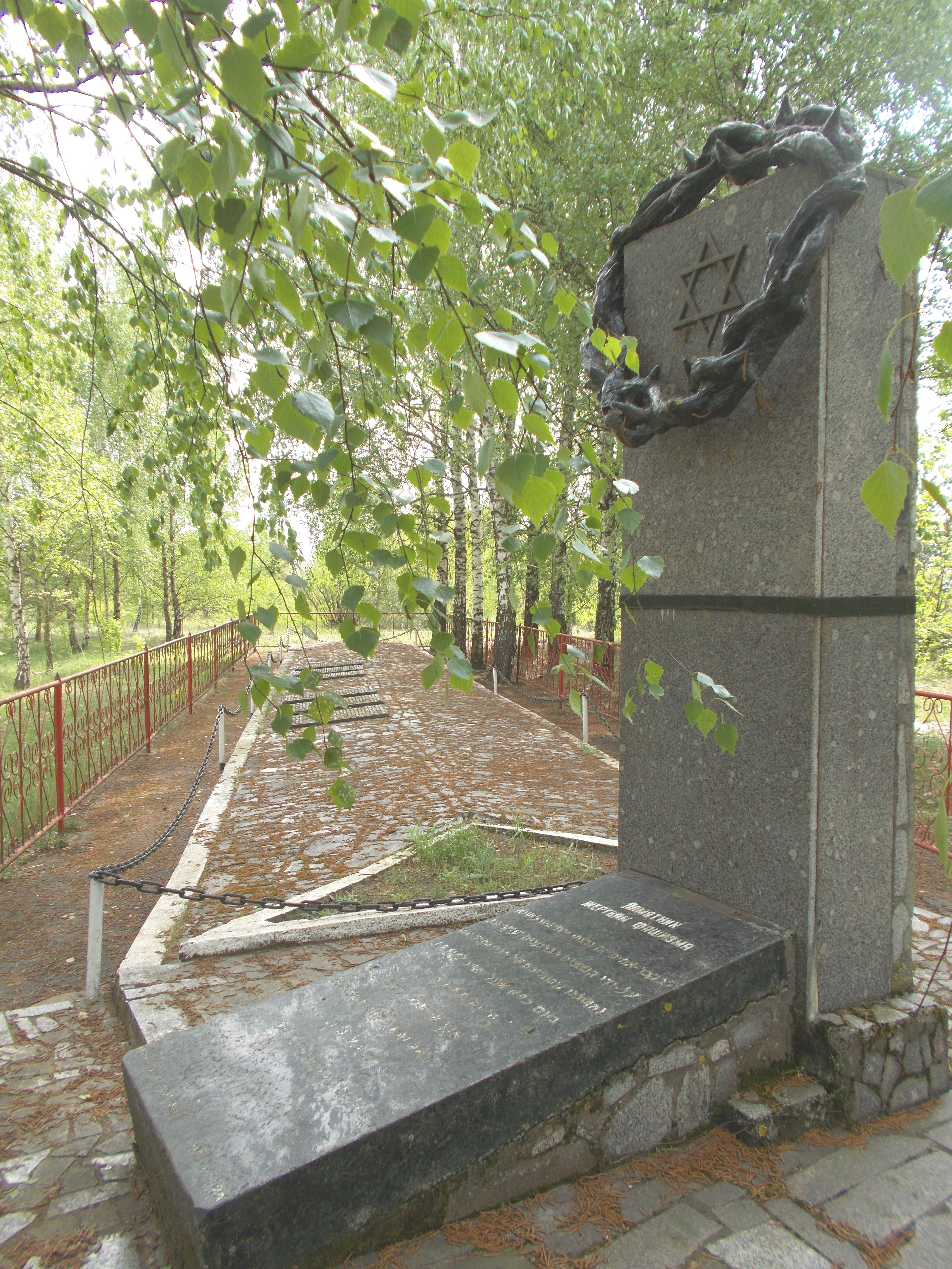 Памятник 1946 евреям Лахвы, убитым нацистами на этом месте 3 сентября 1942 года. Находится на улице Рыбосовхозная.